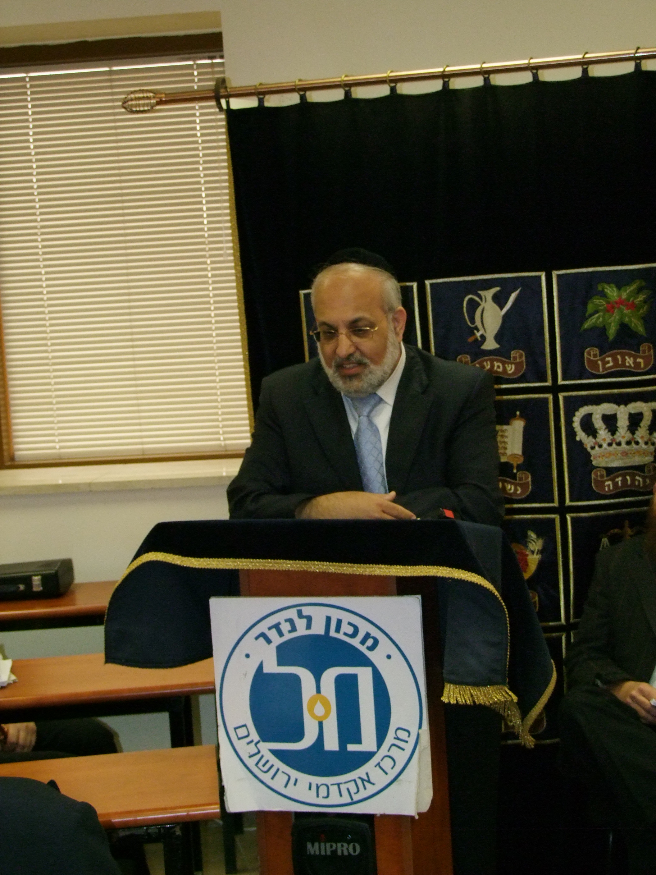 השר משולם נהרי בחנוכת בית הכנסת במכון לנדר